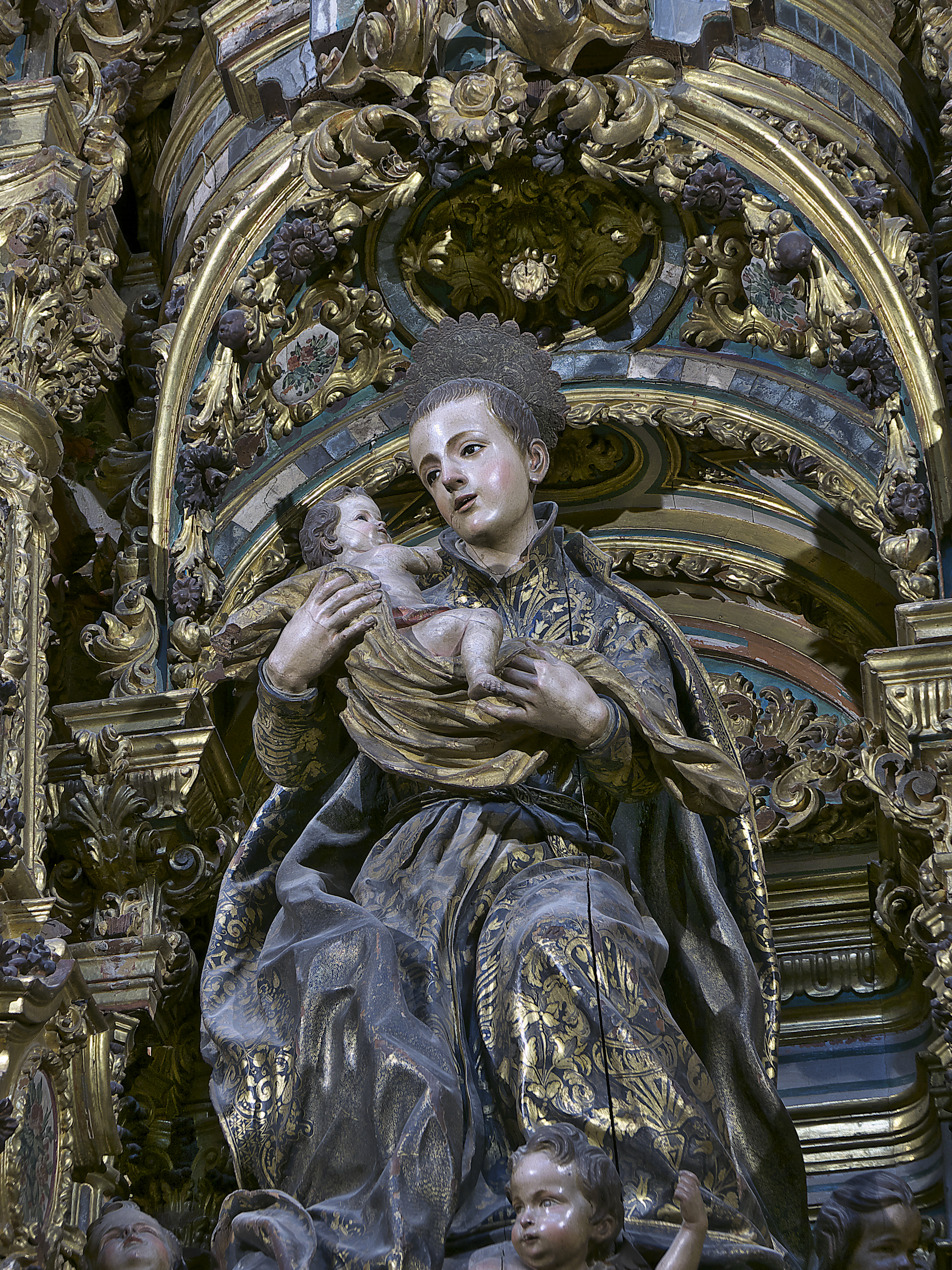 Iglesia de San Luis de los Franceses (Sevilla). Retablo de San Estanislao de Kostka, Pedro Duque Cornejo (1731).